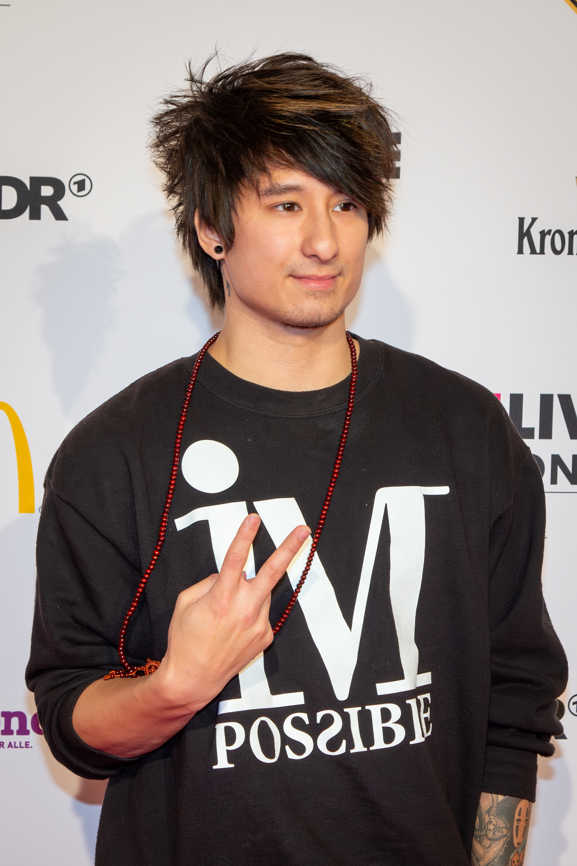 1liVE Krone 2015 - Julien Bam